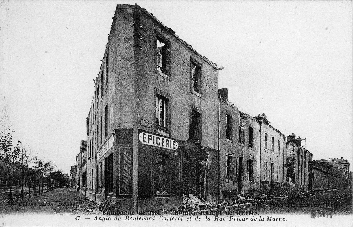 à Reims au sortir de la Grande GUerre.